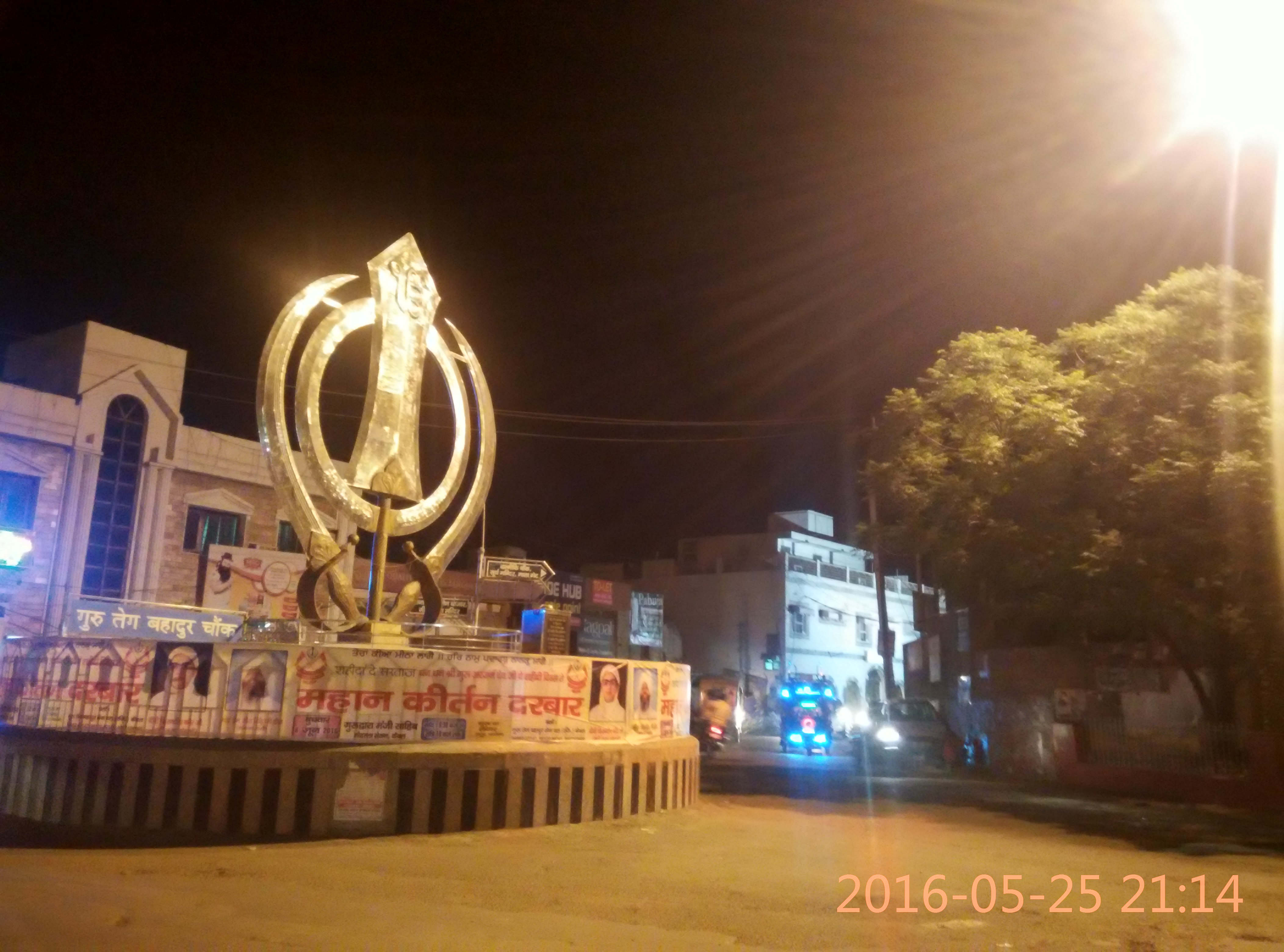 Guru Teg Bahadur Chowk, Kaithal